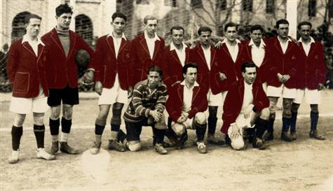 İstanbul'a gelen Viyana karmasıyla 16 Aralık 1925 günü maç yapan Fenerbahçe-Galatasaray karması.